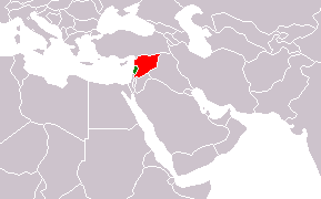 Locator